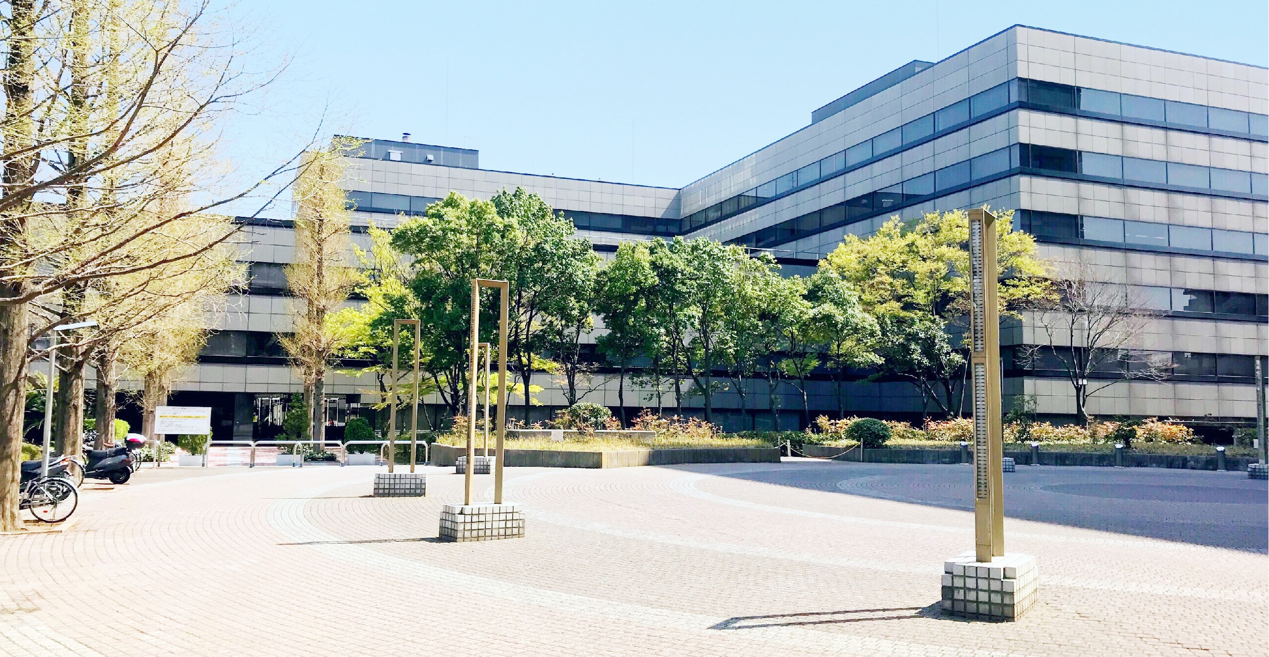 東京計器本社ビル（投稿者自身が撮影）